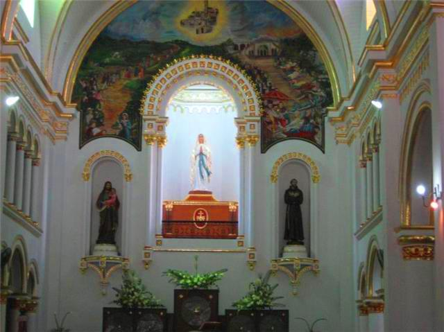 Altar Mayor de la Catedral Nuestra Señora de Lourdes de Florencia (Caquetá)